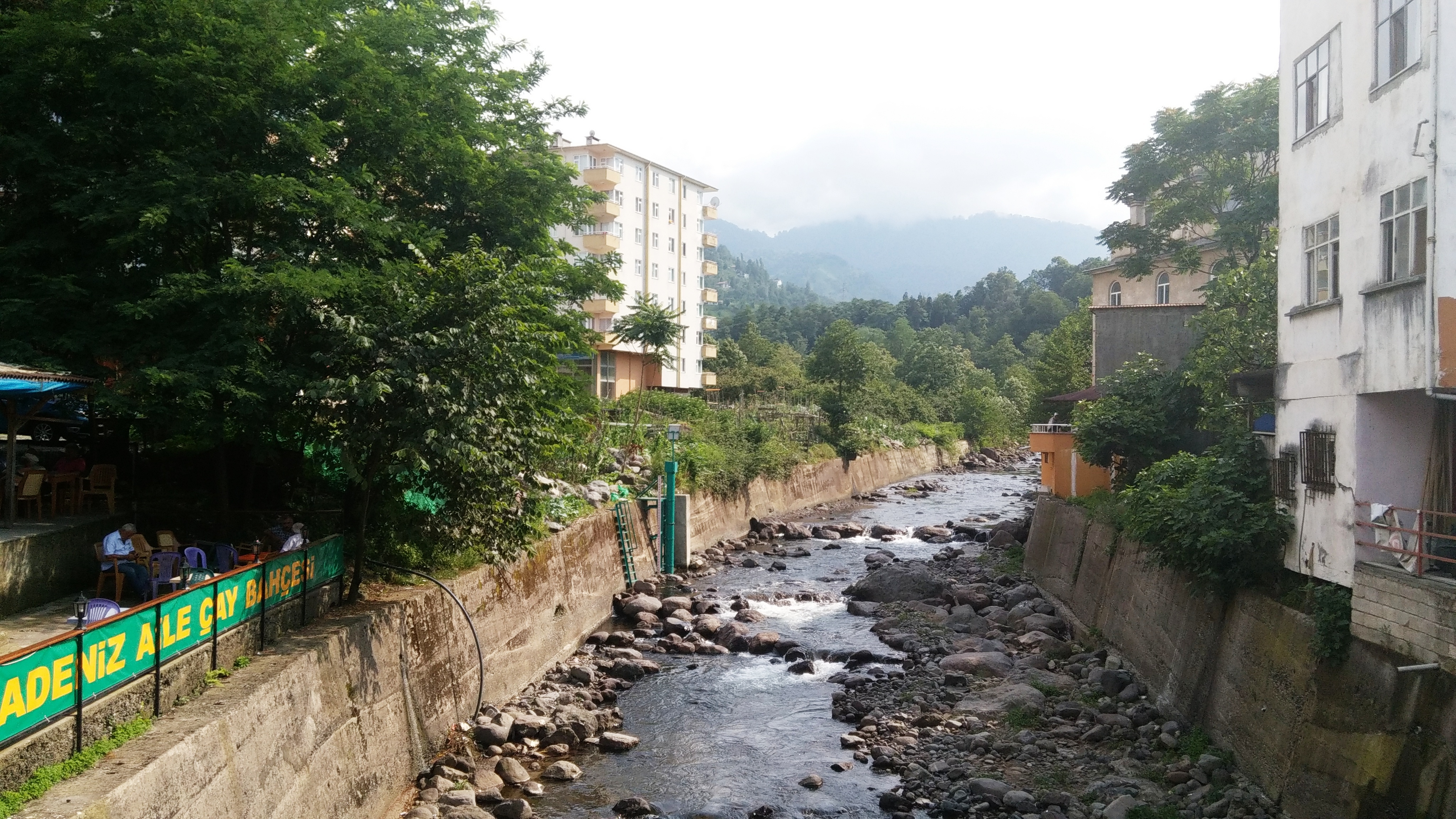 მდინარე ქემალფაშაში